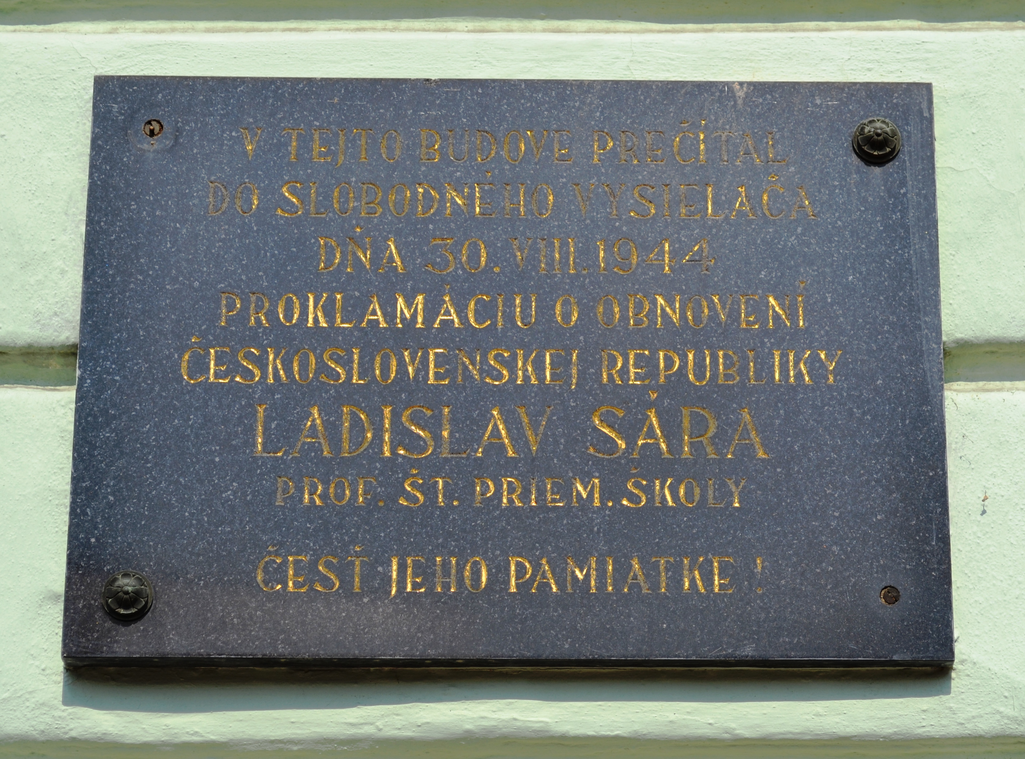 Pamätná tabuľa venovaná na pamiatku Ladislavovi Sárovi v Banskej Bystrici na Hornej 21, vľavo od vchodu do budovy Evanjelického spolku